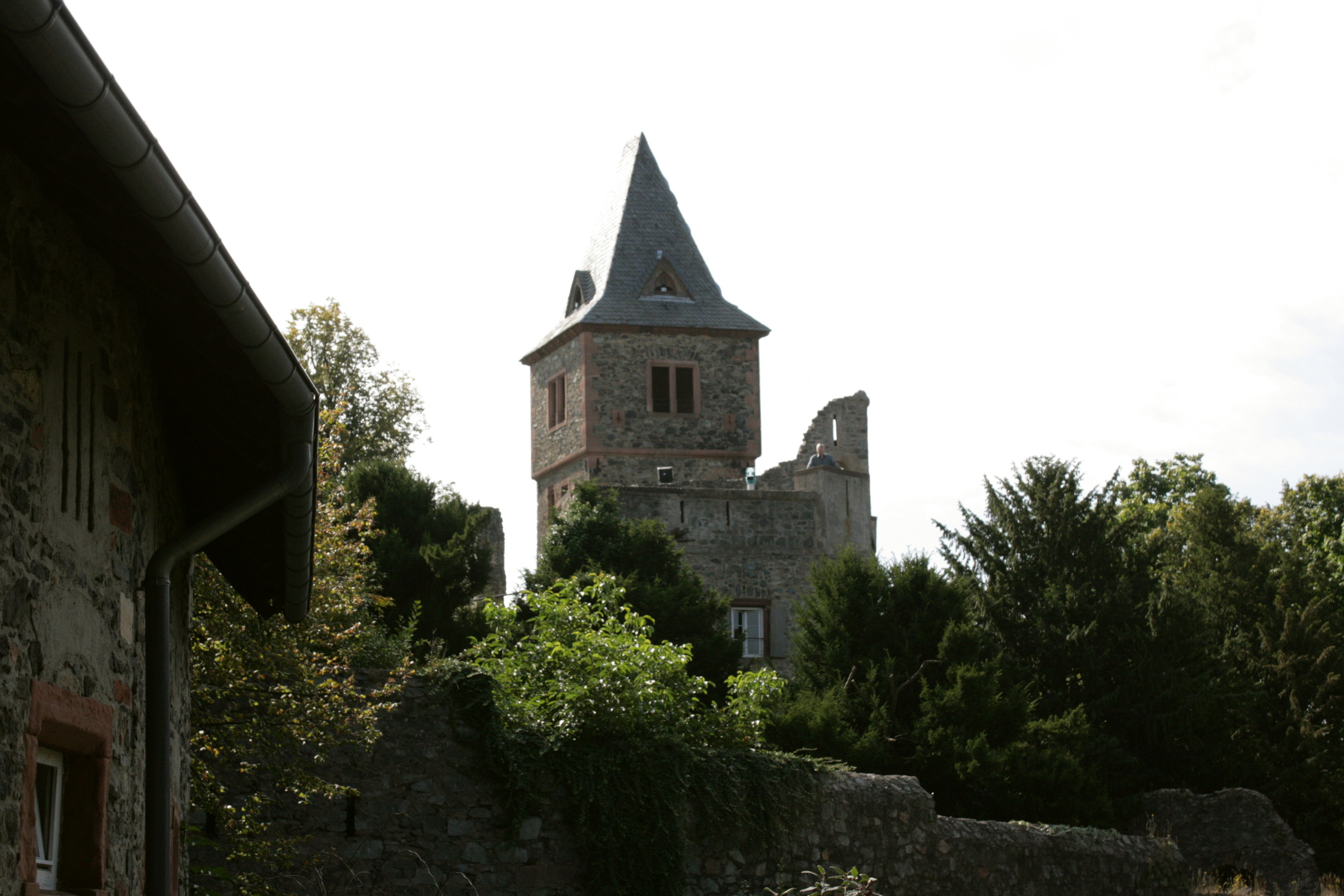 Burg Frankenstein in Mühltal (Hessen)